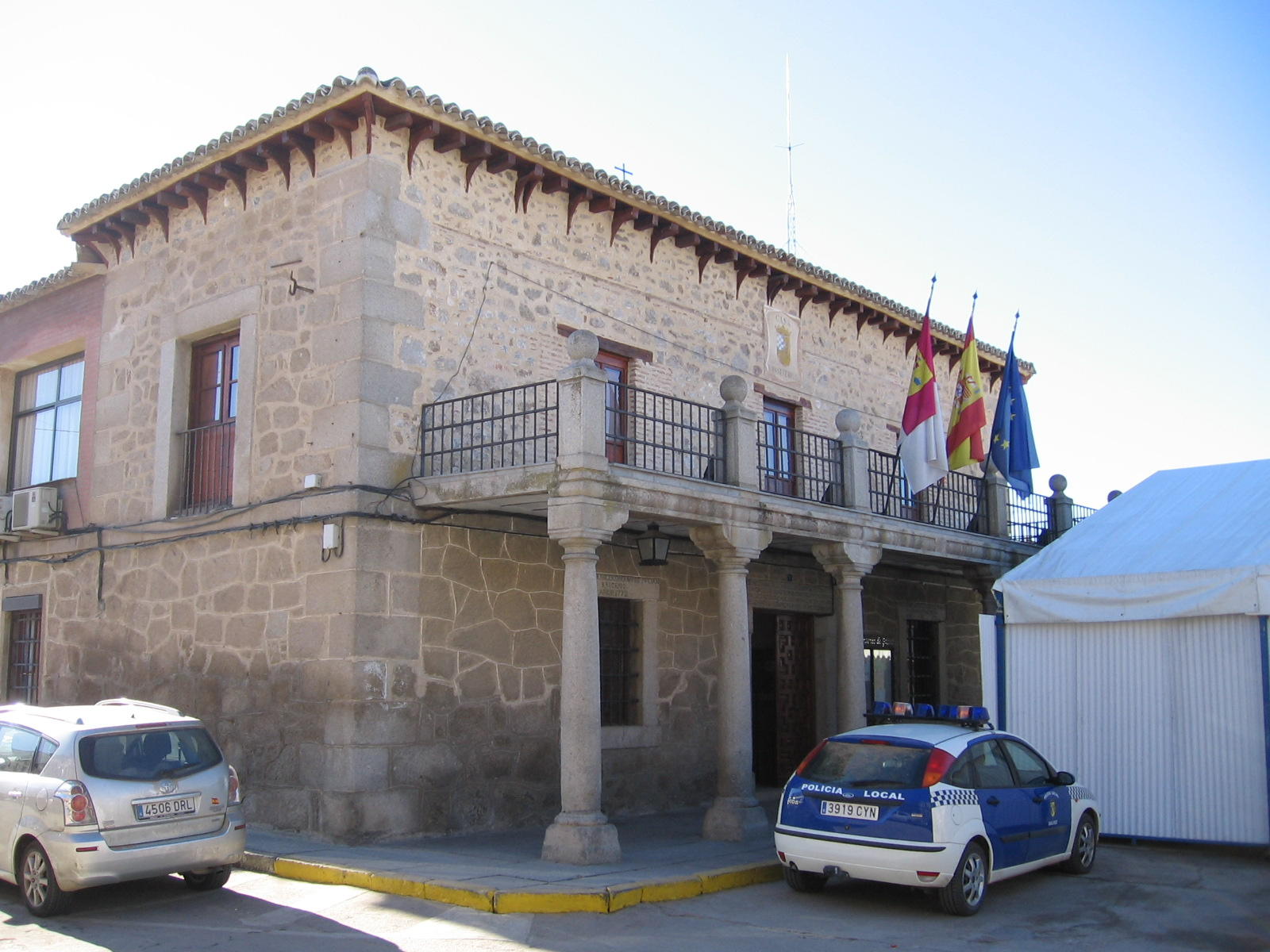 Ayuntamiento de Gálvez (Toledo)